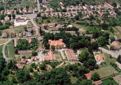 Panoramo de Bercel.